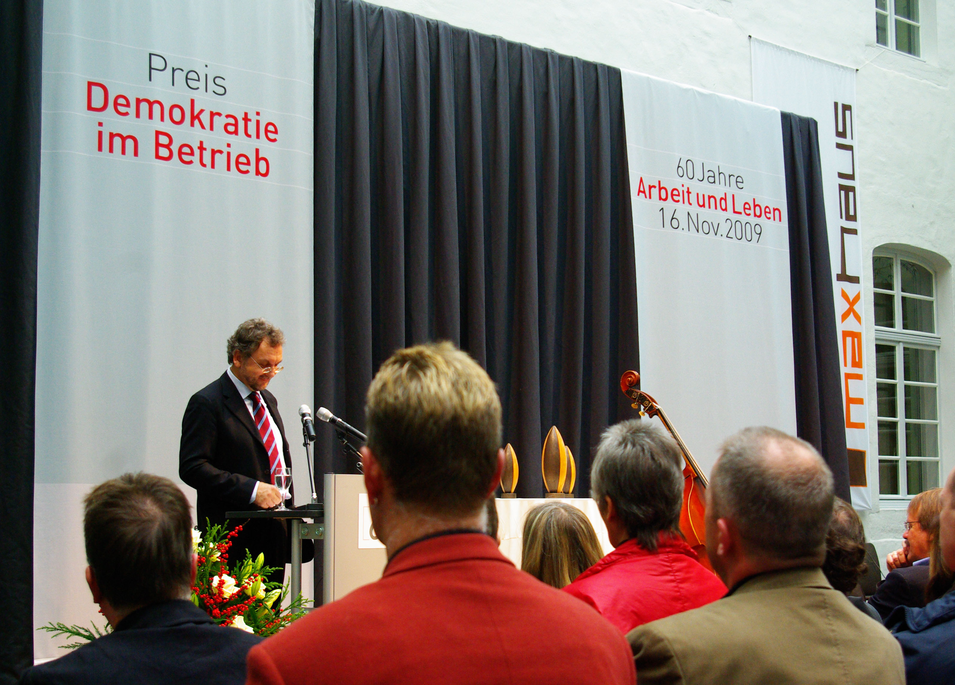 Heribert Prantl (Sueddeutsche Zeitung) hält die Laudatio auf die Preisträger 2009.